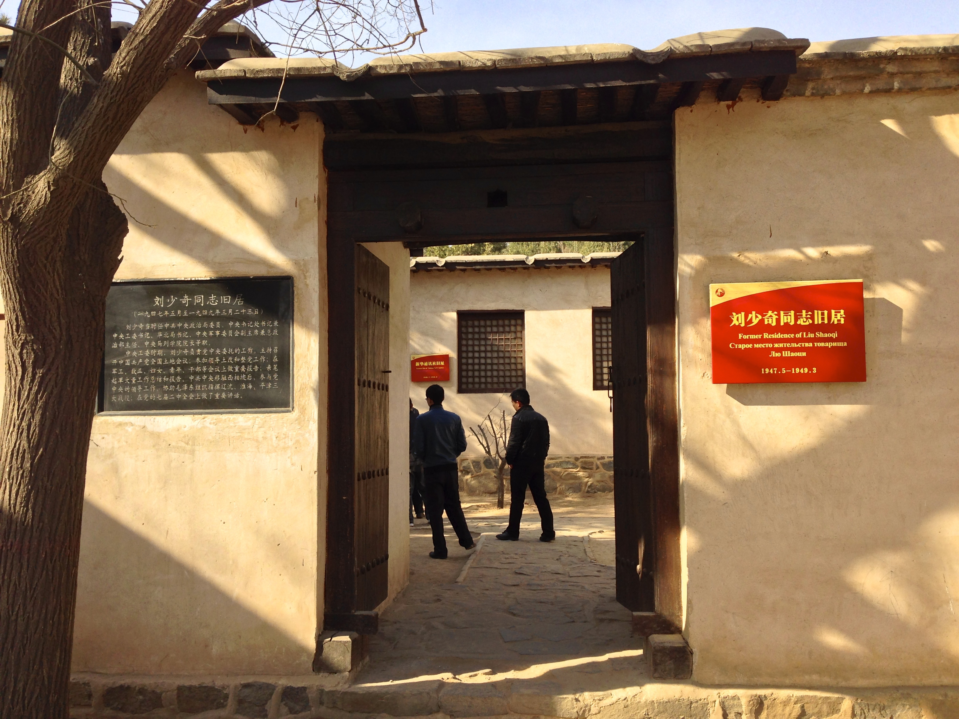 劉少奇舊居